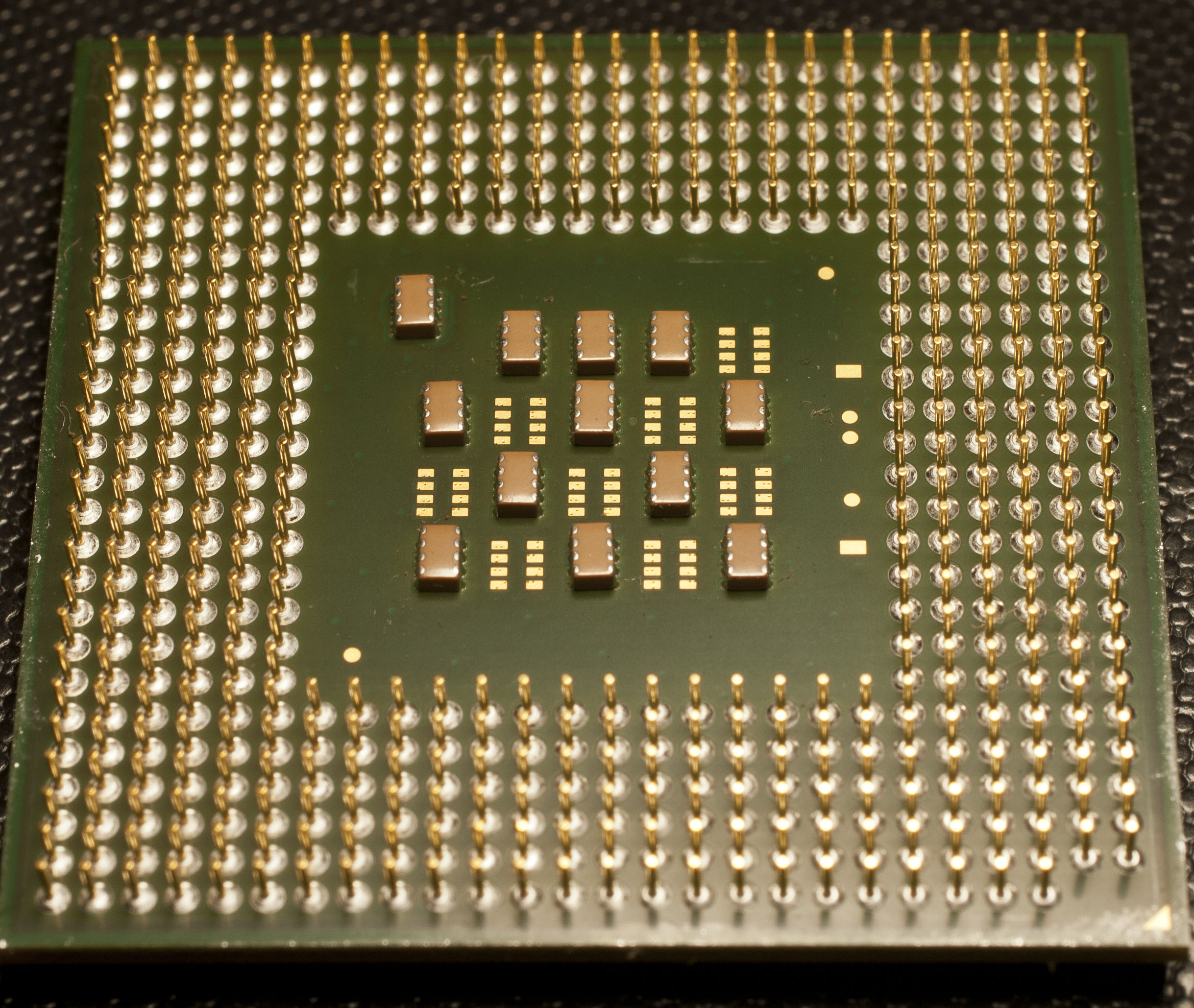 Intel Pentium 4